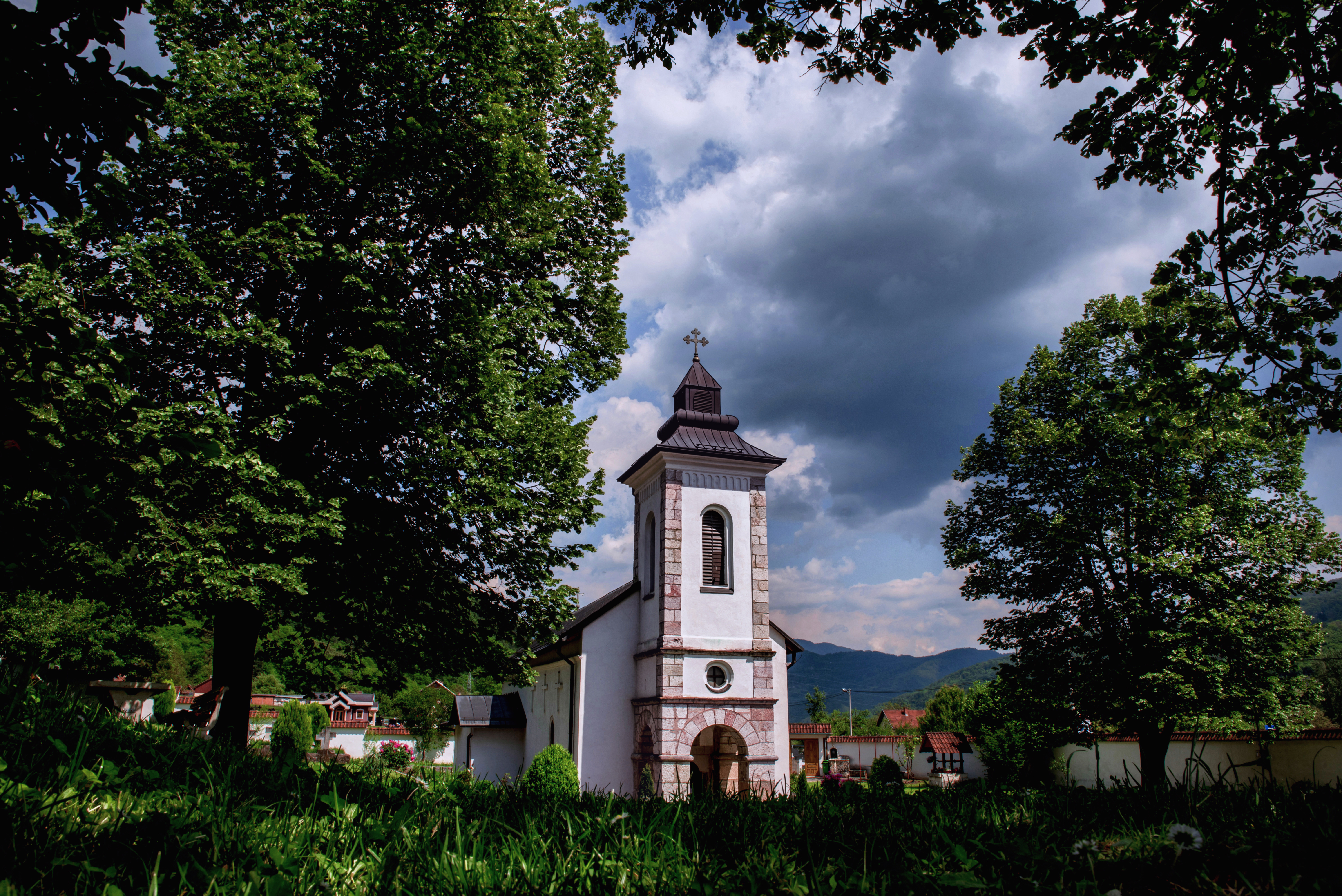 Црква св. Георгија, Сопотница, Ново Горажде ID добра: NKD518